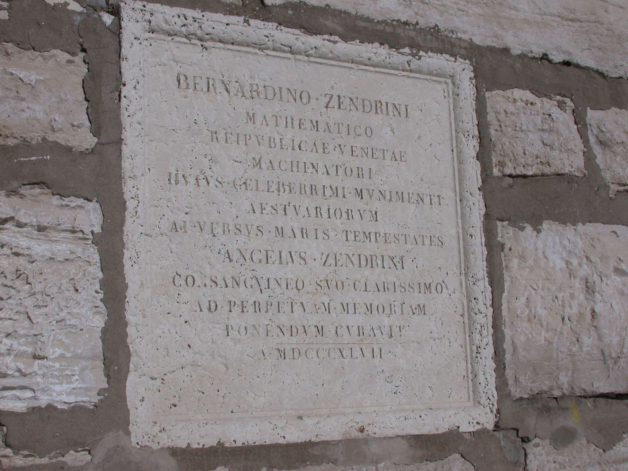 Lapide posta in ricordo del matematico e architetto Bernardino Zendrini sui Murazzi presso Pellestrina ISCR: BERNARDINO ZENDRINI / MATHEMATICO / REIPUBLICAE VENETAE / MACHINATORI / HUIUS CELEBERRIMI MONIMENTI / AESTUARIORUM / AI VERSUS MARI TEMPESTATES / ANGELUS ZENDRINI / CONSANGUINEO SUO CLARISSIMO / AD PERPETUAM MEMORIAM / PONENDUM CURAVIT / A MDCCCXLVII